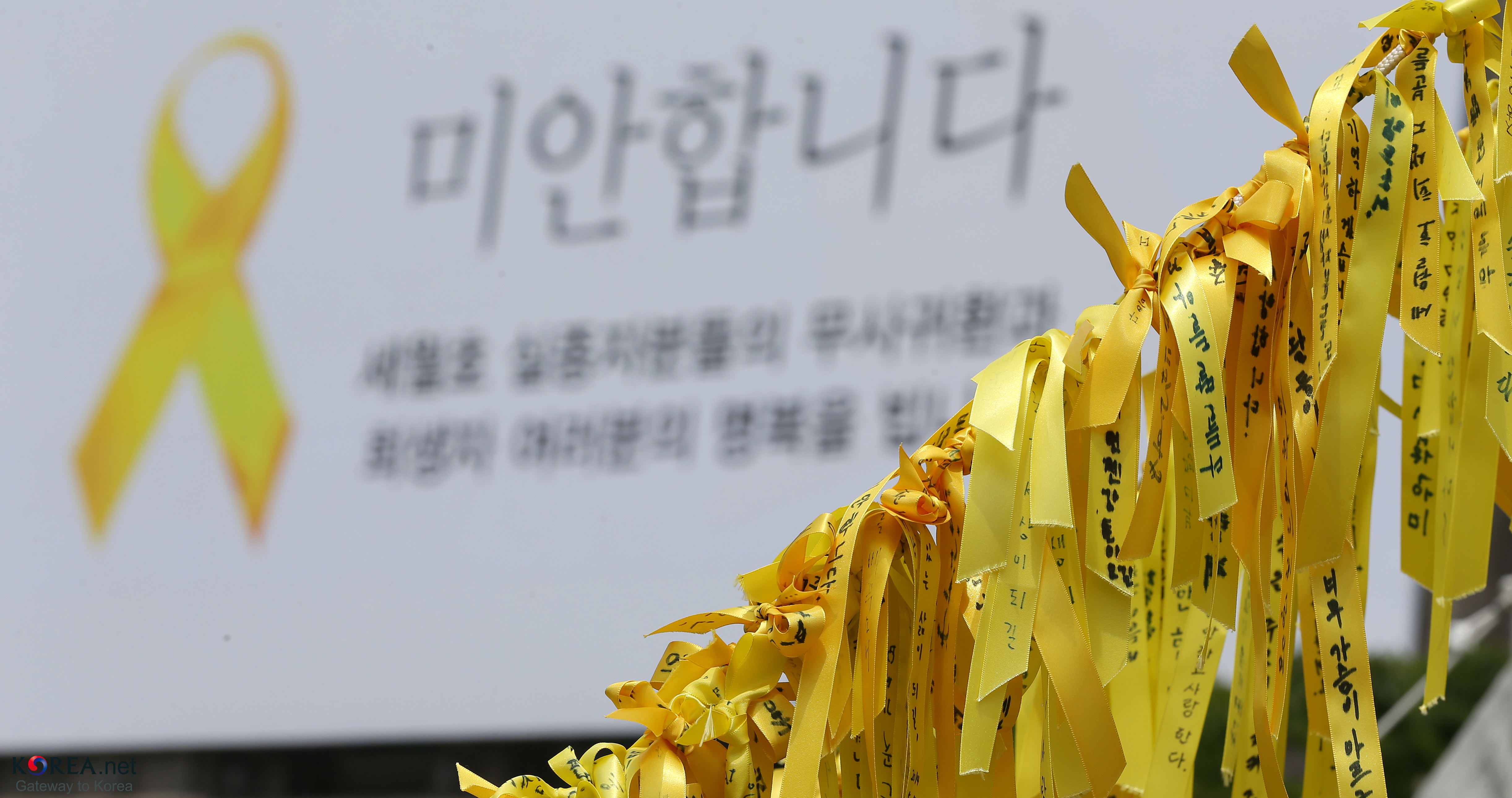 세월호 추모 리본 (2014년 5월 7일)